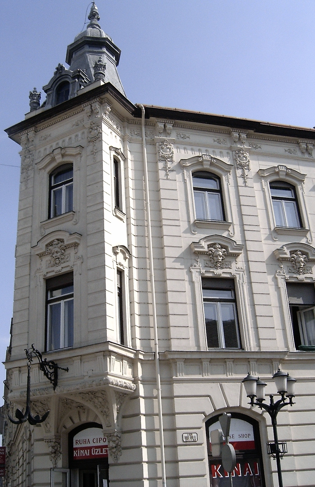 A vasmacskás ház a Baross úton, Győr (Győr-Moson-Sopron megye)